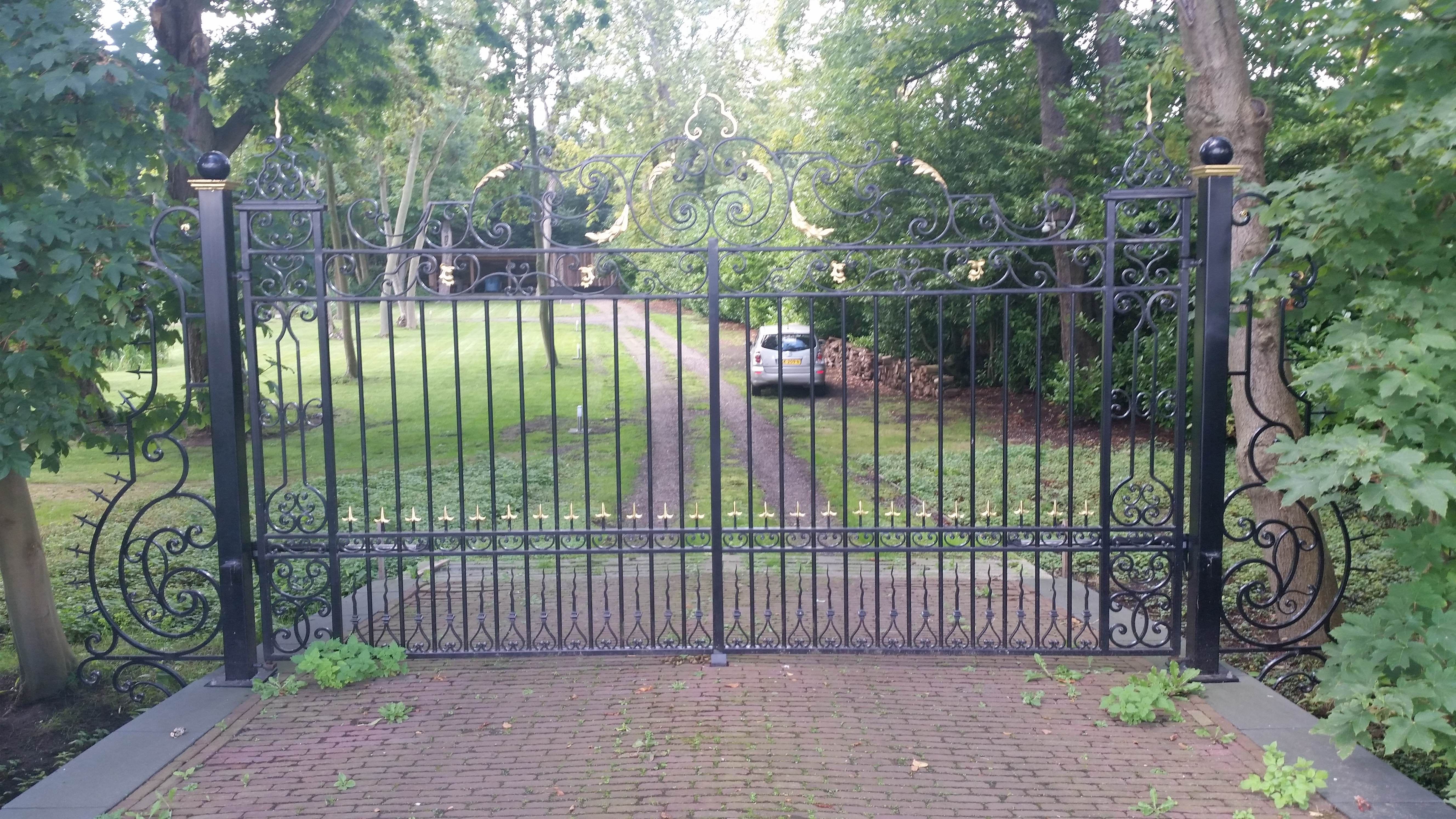 Tweede hekwerk op Amstelrust